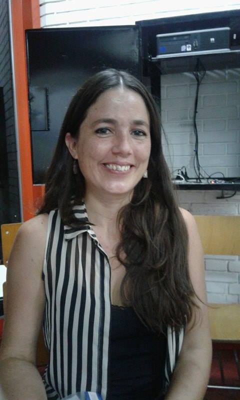 Noelia Barbeito en 2017.